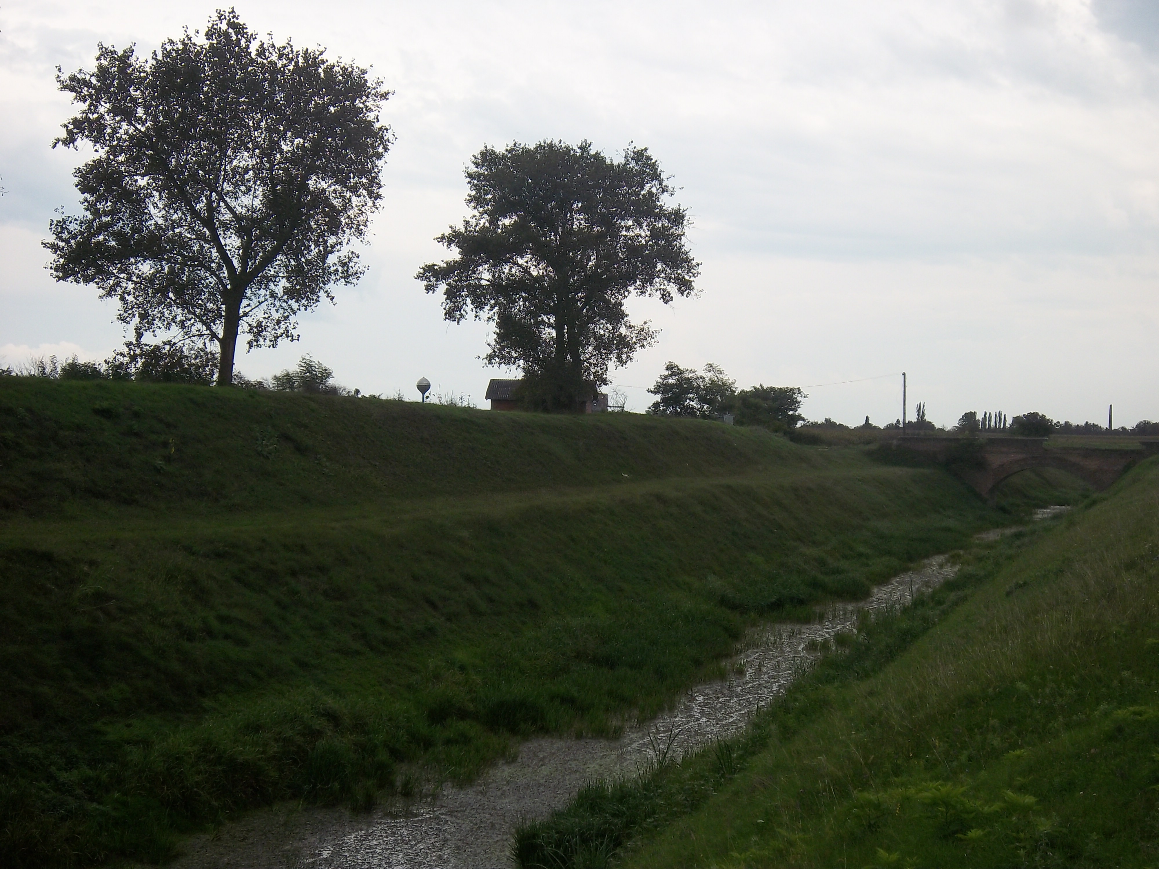 Српски (ћирилица): Боботски канал